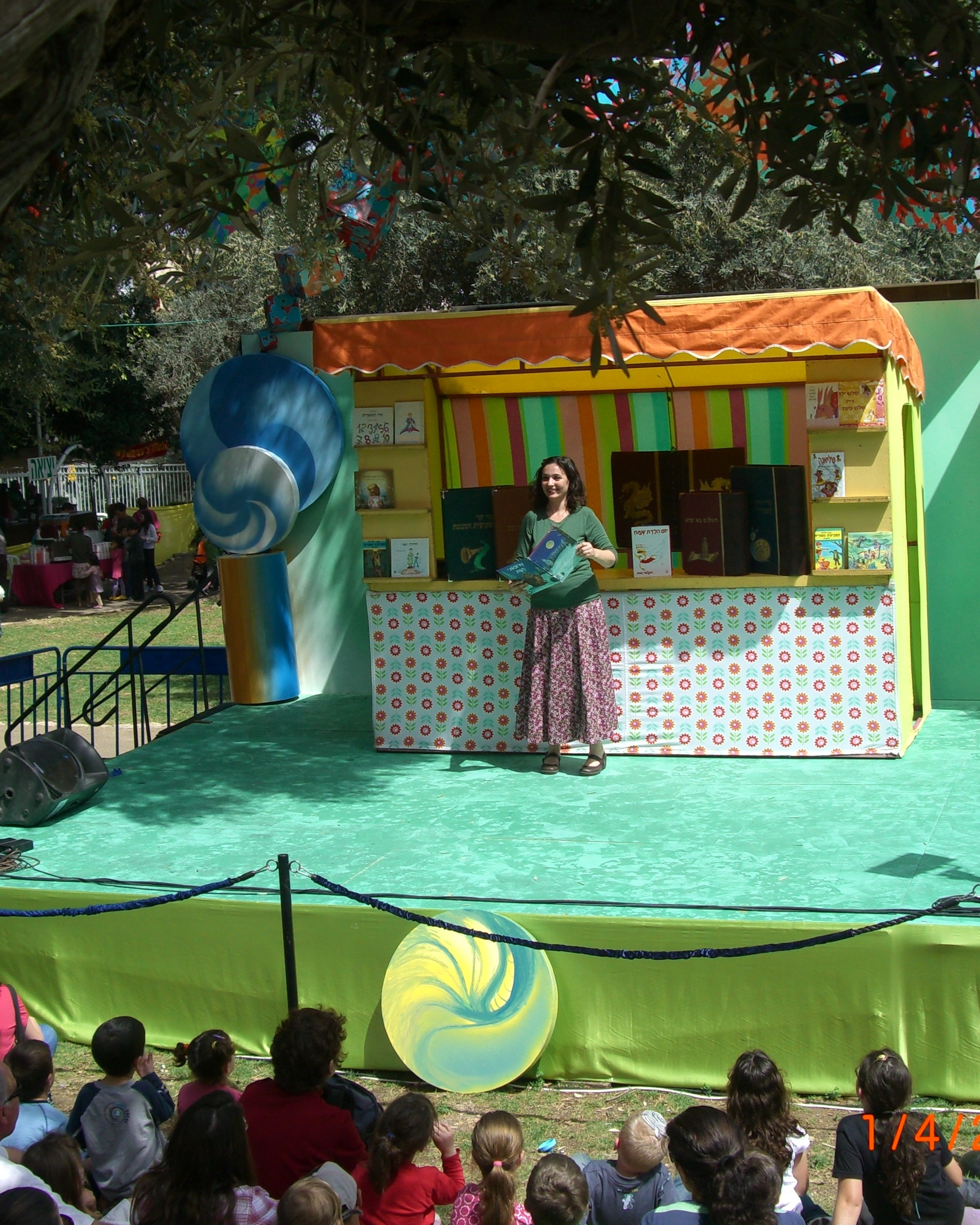 6 לא סתם סיפור - פסטיבל חיפה 2010 (בתמונה לובה רעים)